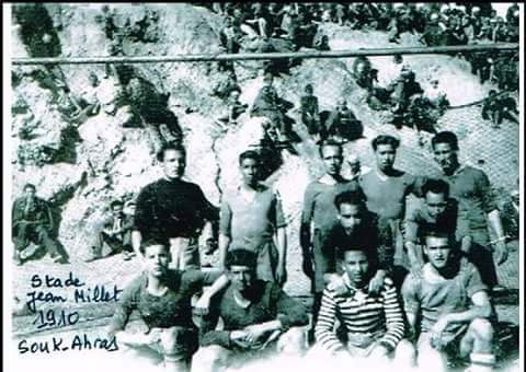 Sporting Club de Souk-Ahras 1922